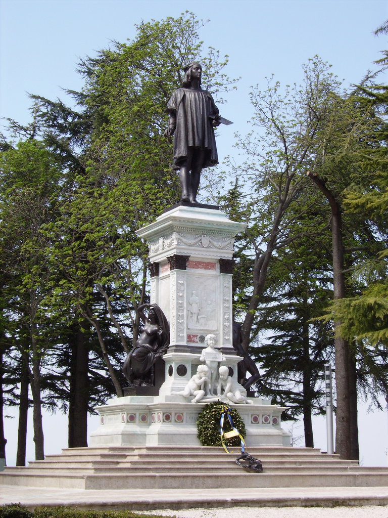 Monumento a Raffaello Sanzio, Urbino.